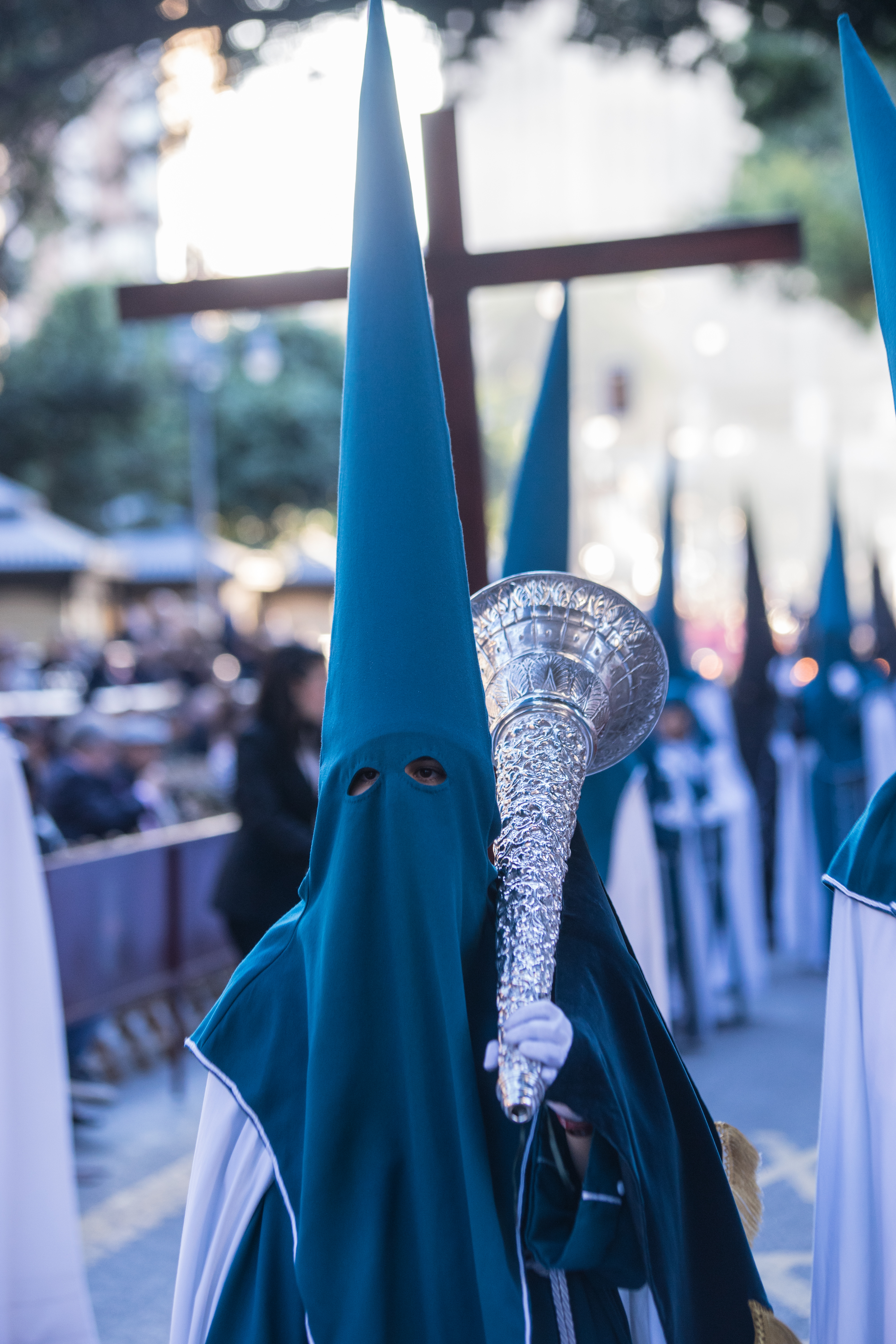 Bocina de la Venerable Hermandad de Nuestro Padre Jesús Nazareno Redentor del Mundo y Nuestra Señora Mediadora de la Salvación This is a photography of a Folklore festival in Spain (Wikidata id Q9075883).